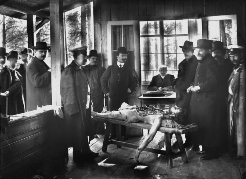 Вскрытие тела священника Георгия Гапона на даче в Озерках Дата съемки: апрель 1906